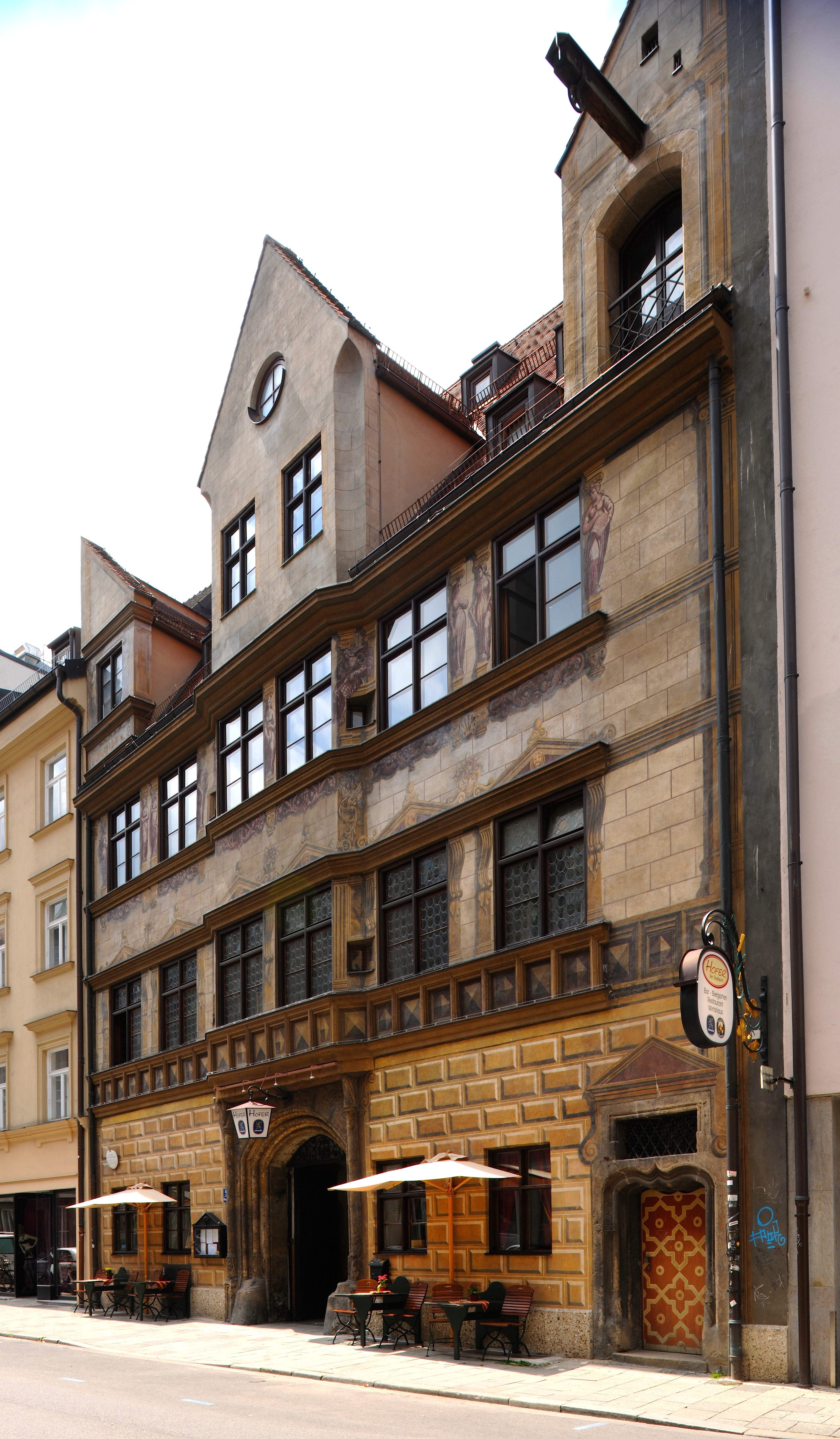 München, Burgstraße 5, Weinstadl. Die im Sommer 1963 durch den Restaurator und Kunstmaler Josef Lorch mit allergrößter Sorgfalt und extremen Aufwand wieder komplettierte Fassadenfreskomalereien, im sogenannten neuen Renaissancestil, wird dem Hofmaler Hannsen Müelich (Hans Mielich) zugeschrieben, diese wurden im Jahr 1551 aufgebracht.